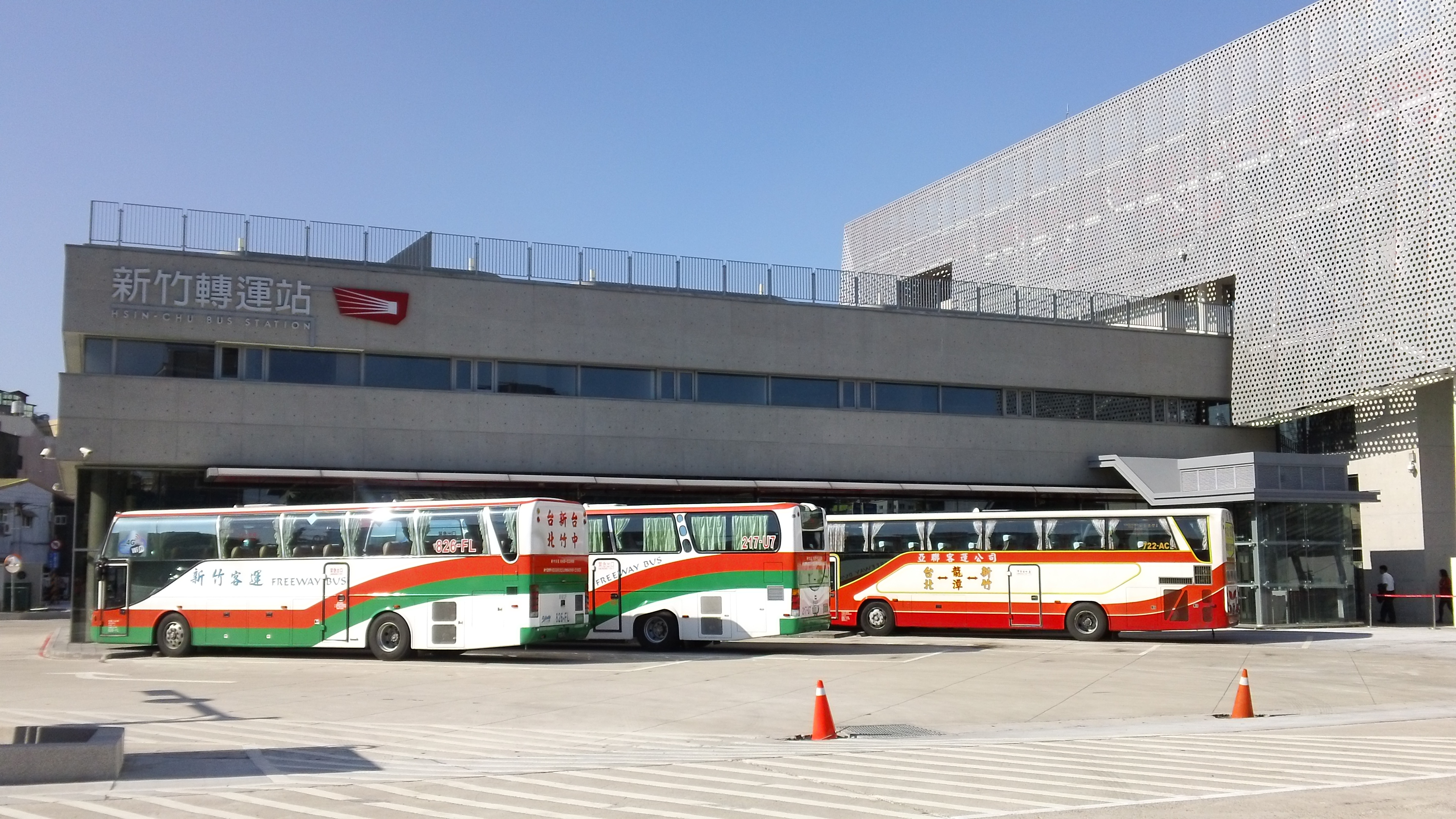 新竹轉運站